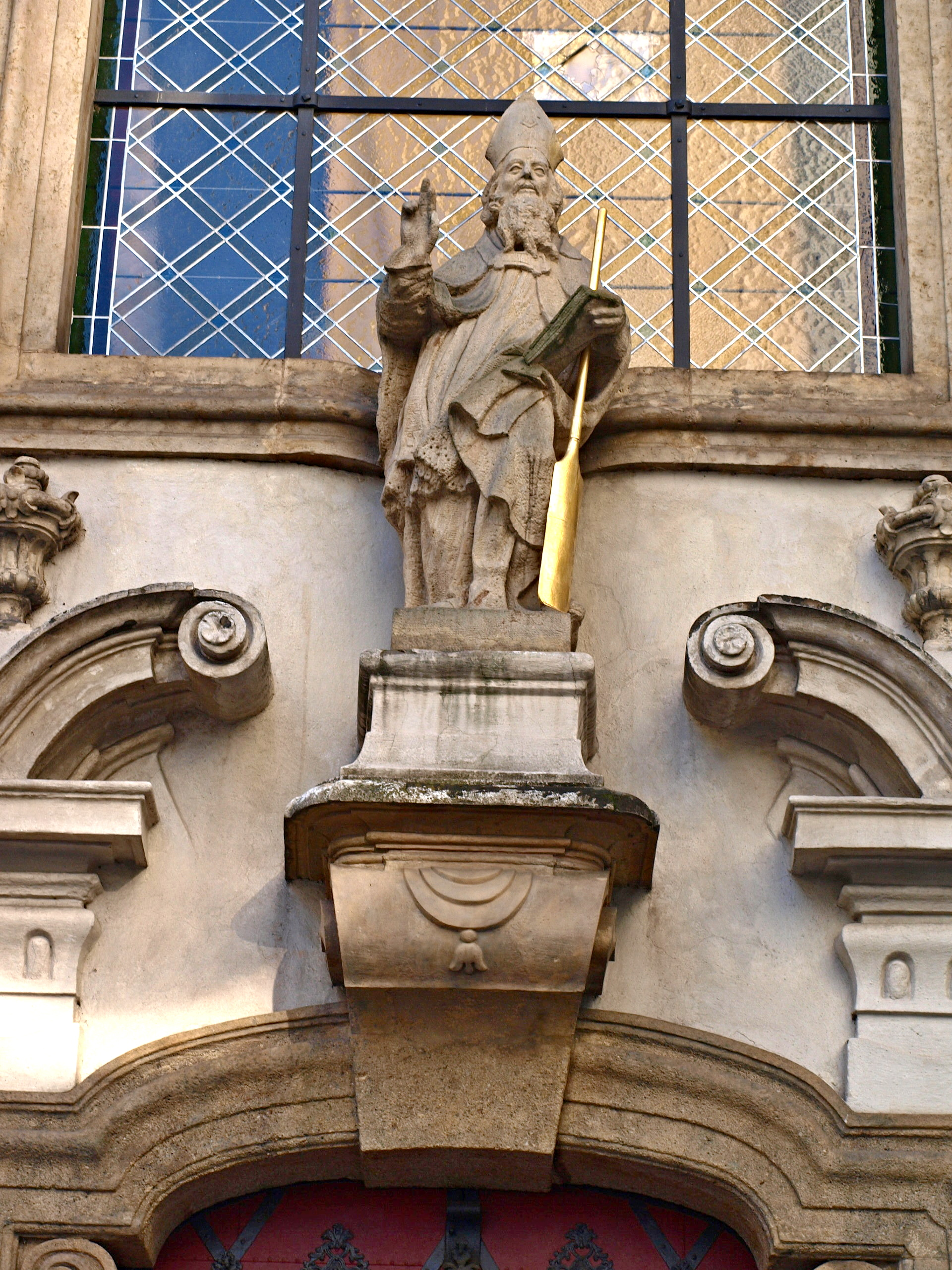 Praha 1-Nové Město, kostel sv. Vojtěcha